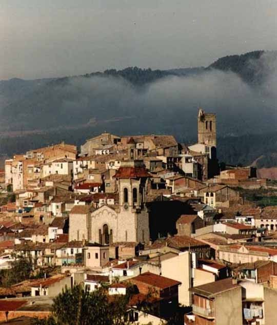 Vista general de Artés view of Artés, Bages